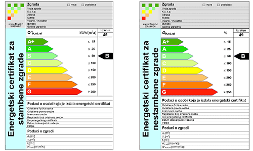 Primjer energetskog certifikata za stambene i nestambene zgrade.